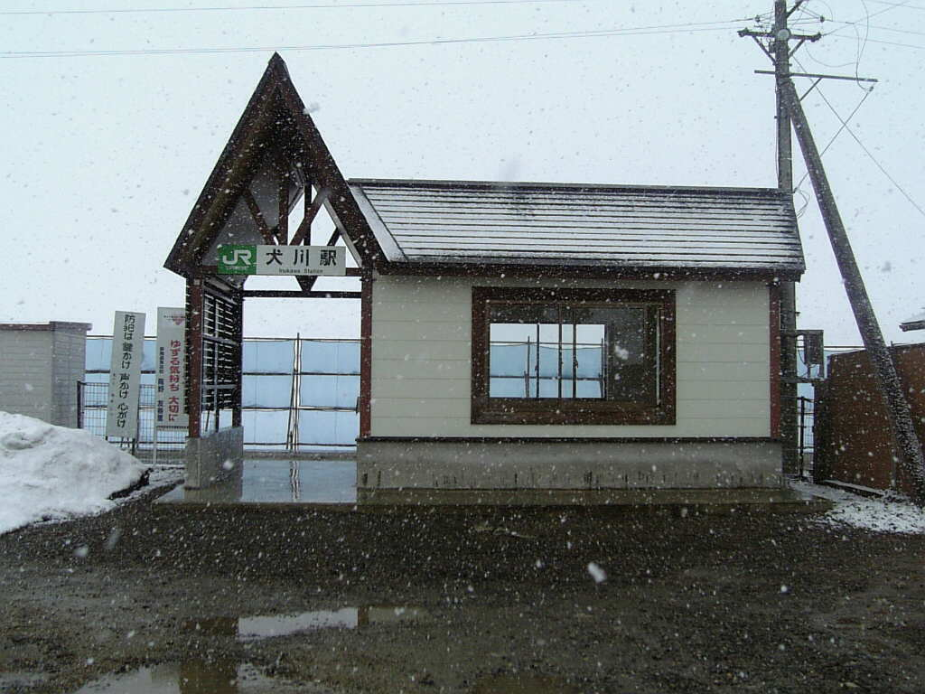 犬川駅駅舎。旅行中本人撮影。